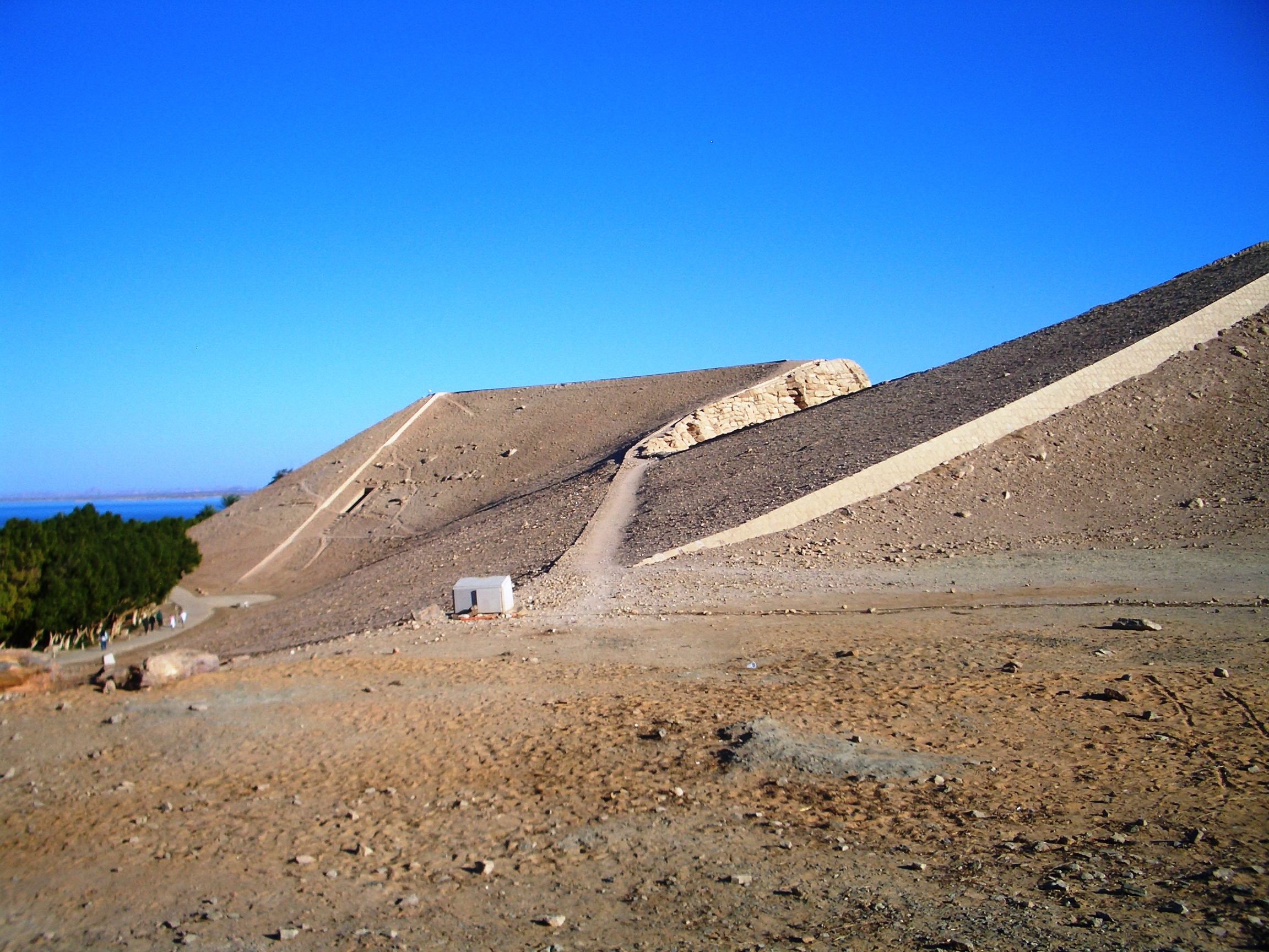 Az Abu Szimbel-i templomok áthelyezésekor épített domb hátulról (Egyiptom)